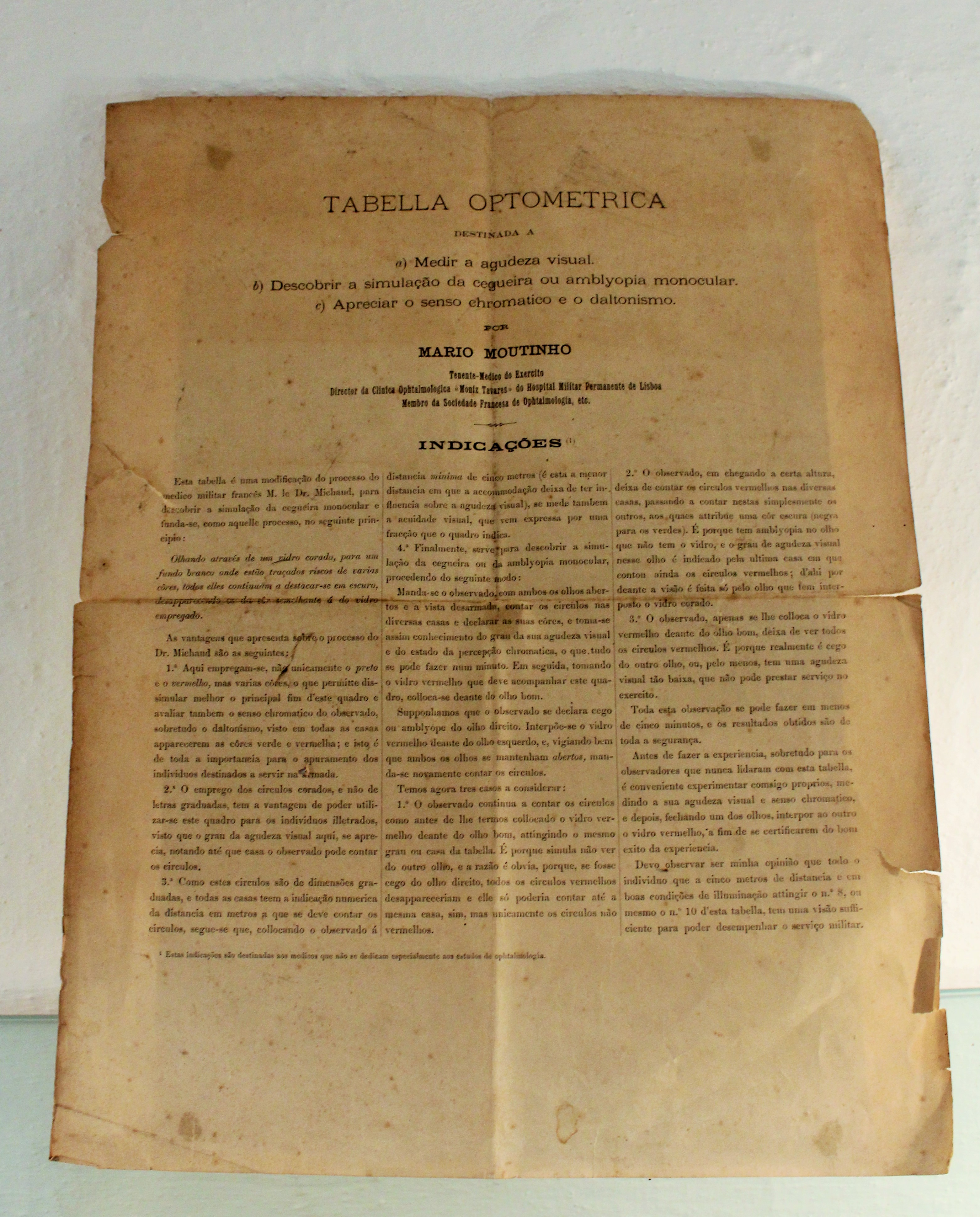 Tabla optométrica destinada a medir la agudeza visual. Autor: Teniente médico Mário Moutinho.